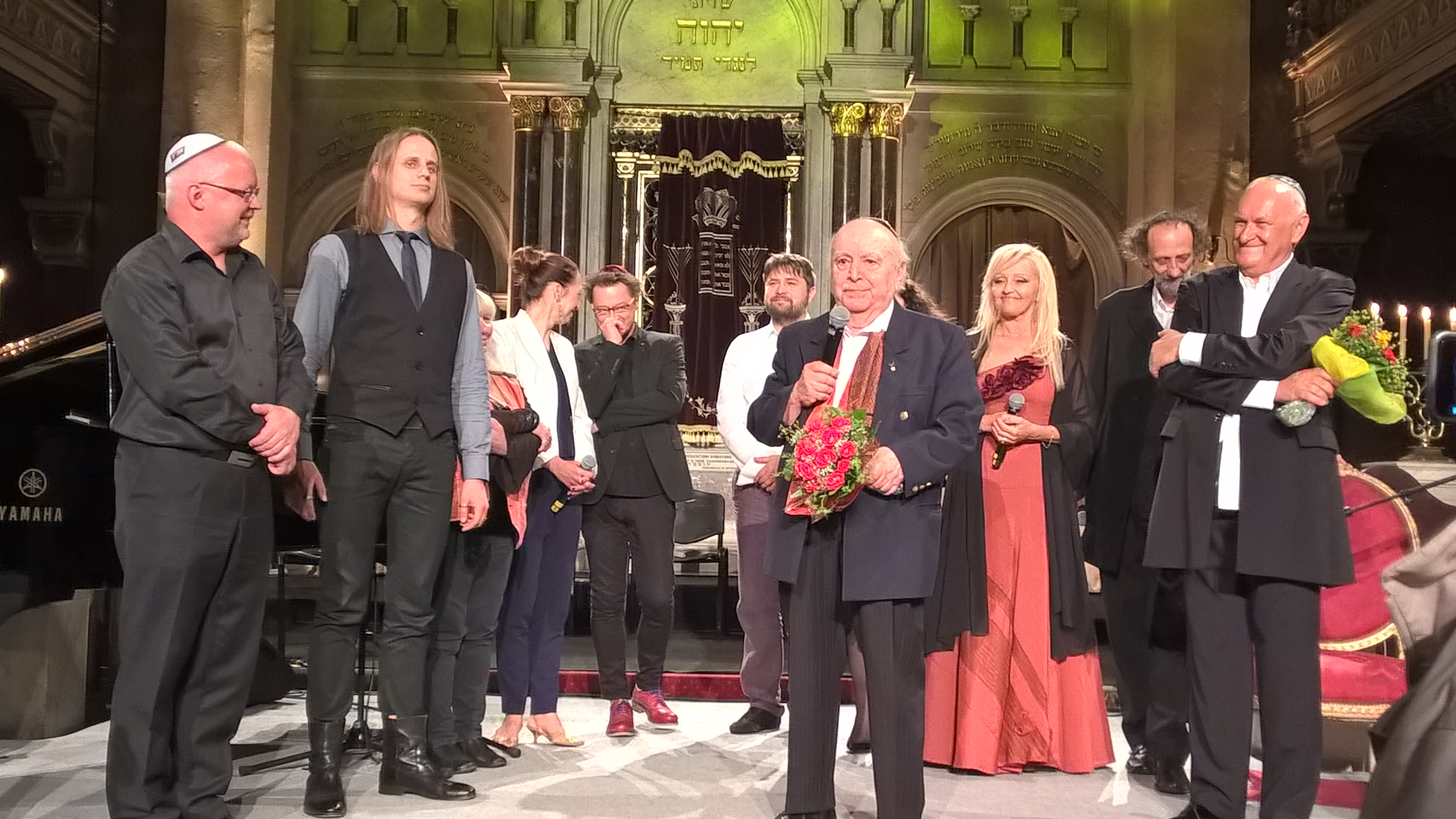 Leopold Kleinman-Kozlowski avec ses chanteurs et musiciens après un concert à la synagogue Tempel de Cracovie le 3 juillet 2016